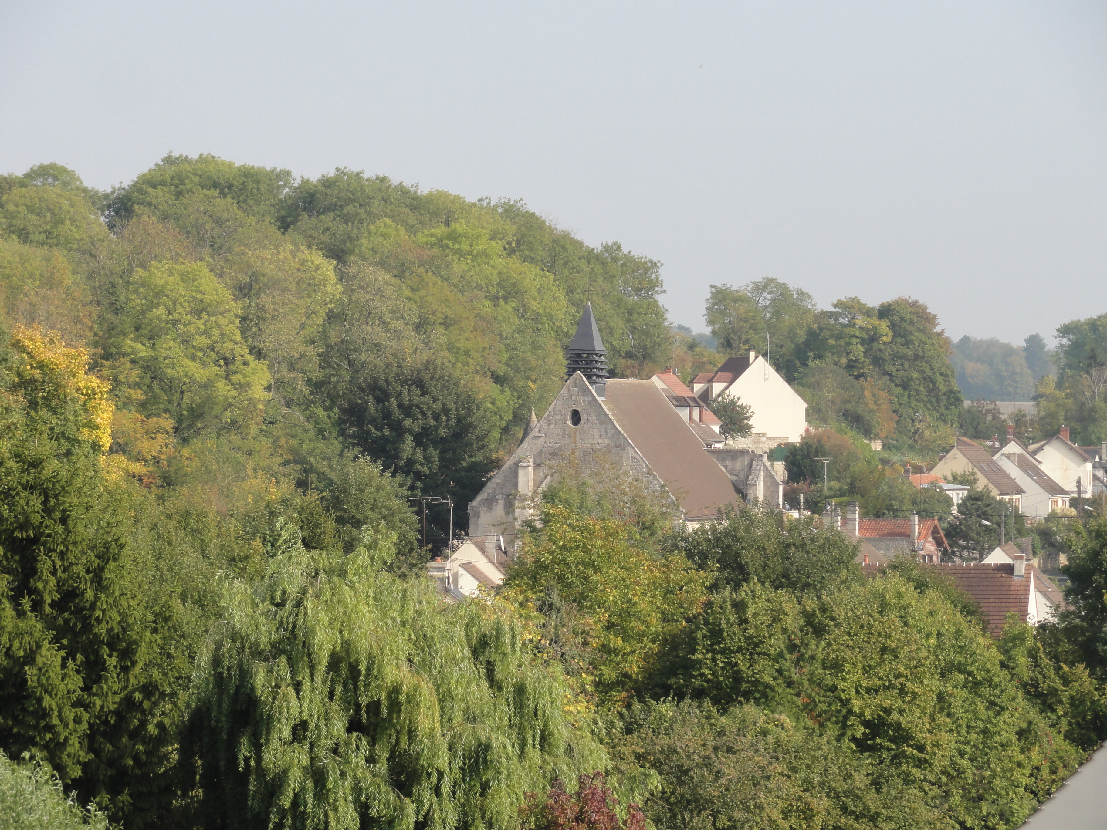 Église Saint-Martin de Bouillant - voir titre.